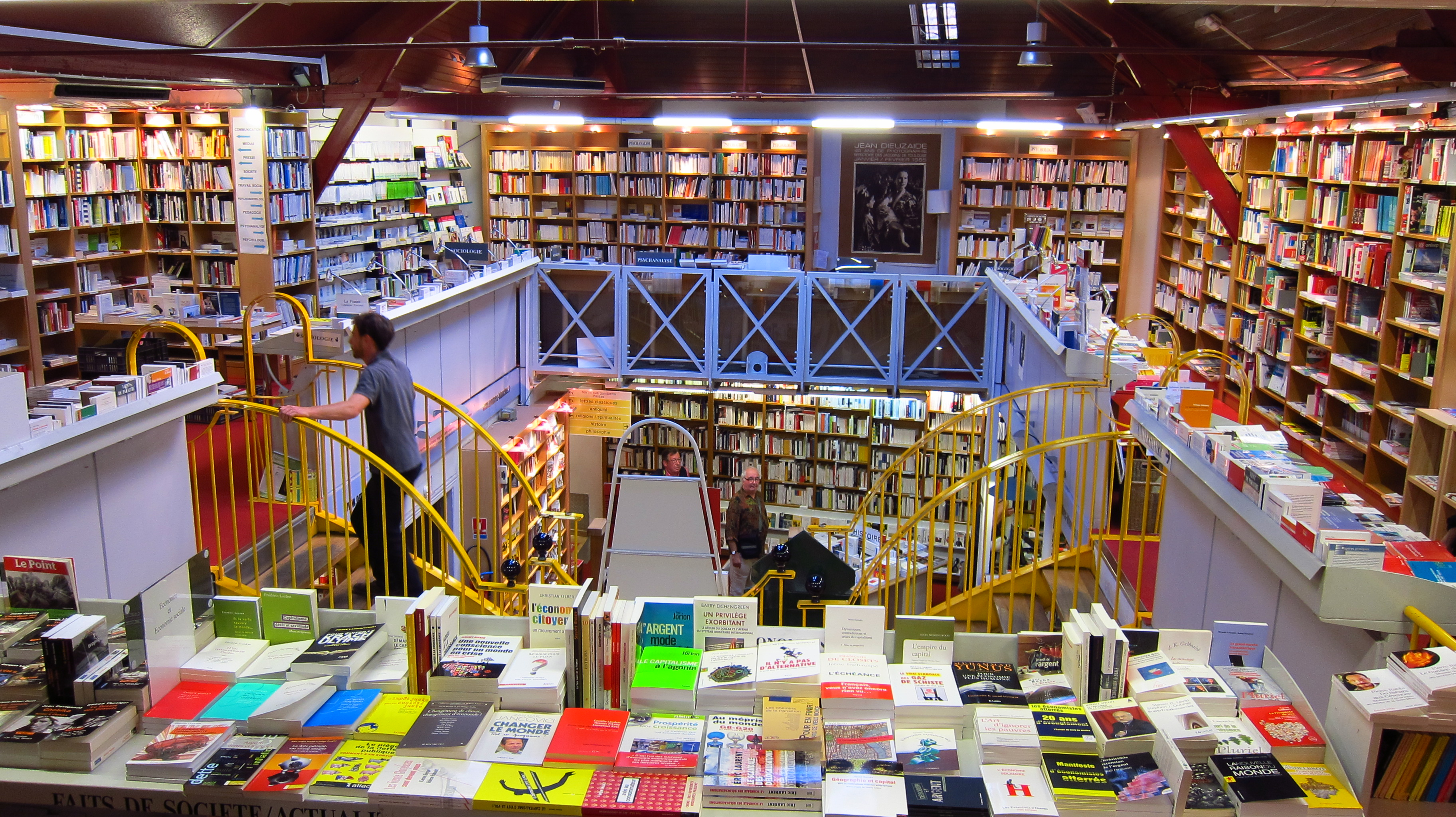 Toulouse (Haute-Garonne, France) : Intérieur de la librairie "Ombres Blanches".